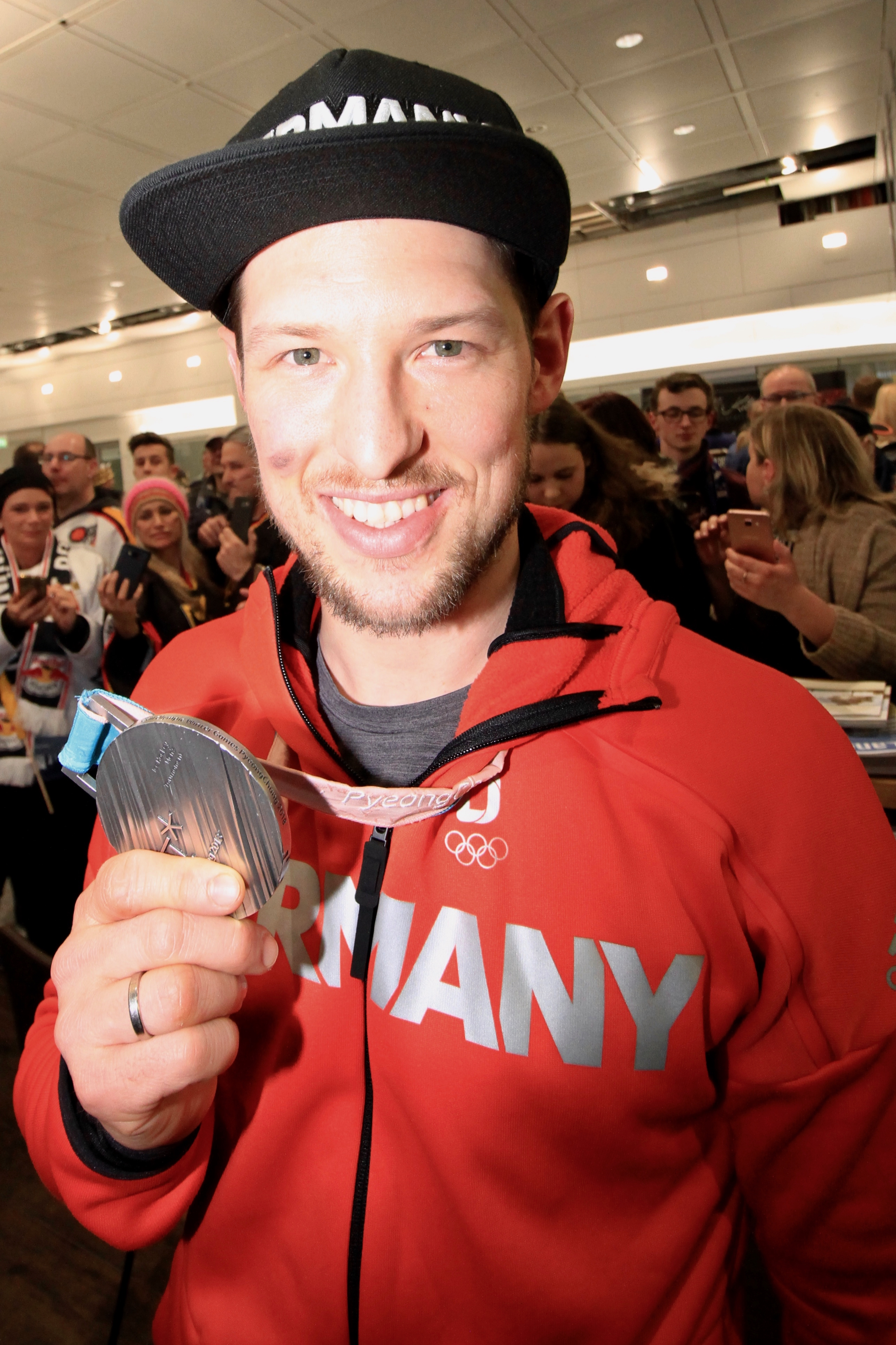 Patrick Hager mit Olympia Silbermedaille bei Ankunft.